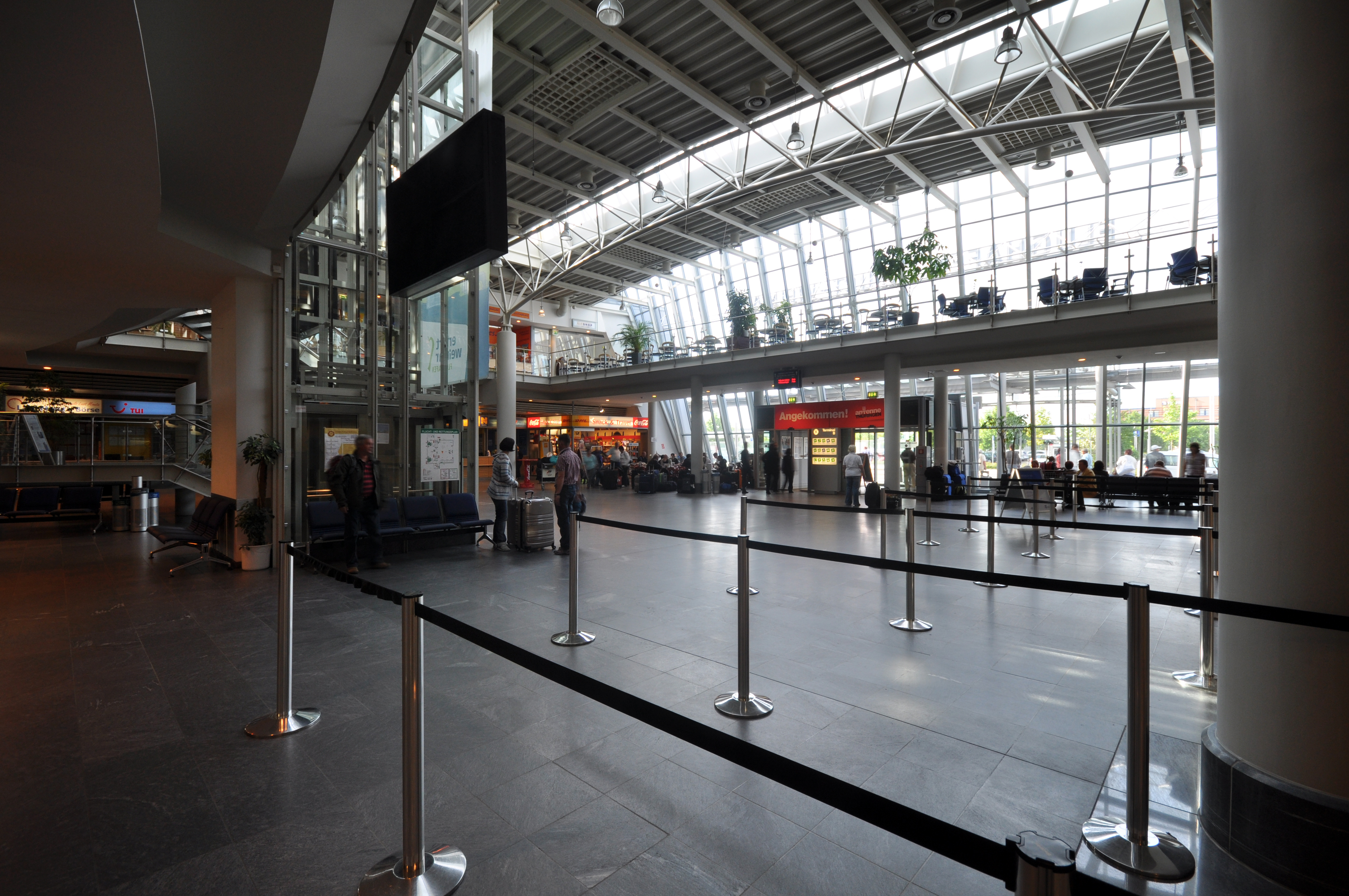 Flughafen Erfurt-Weimar